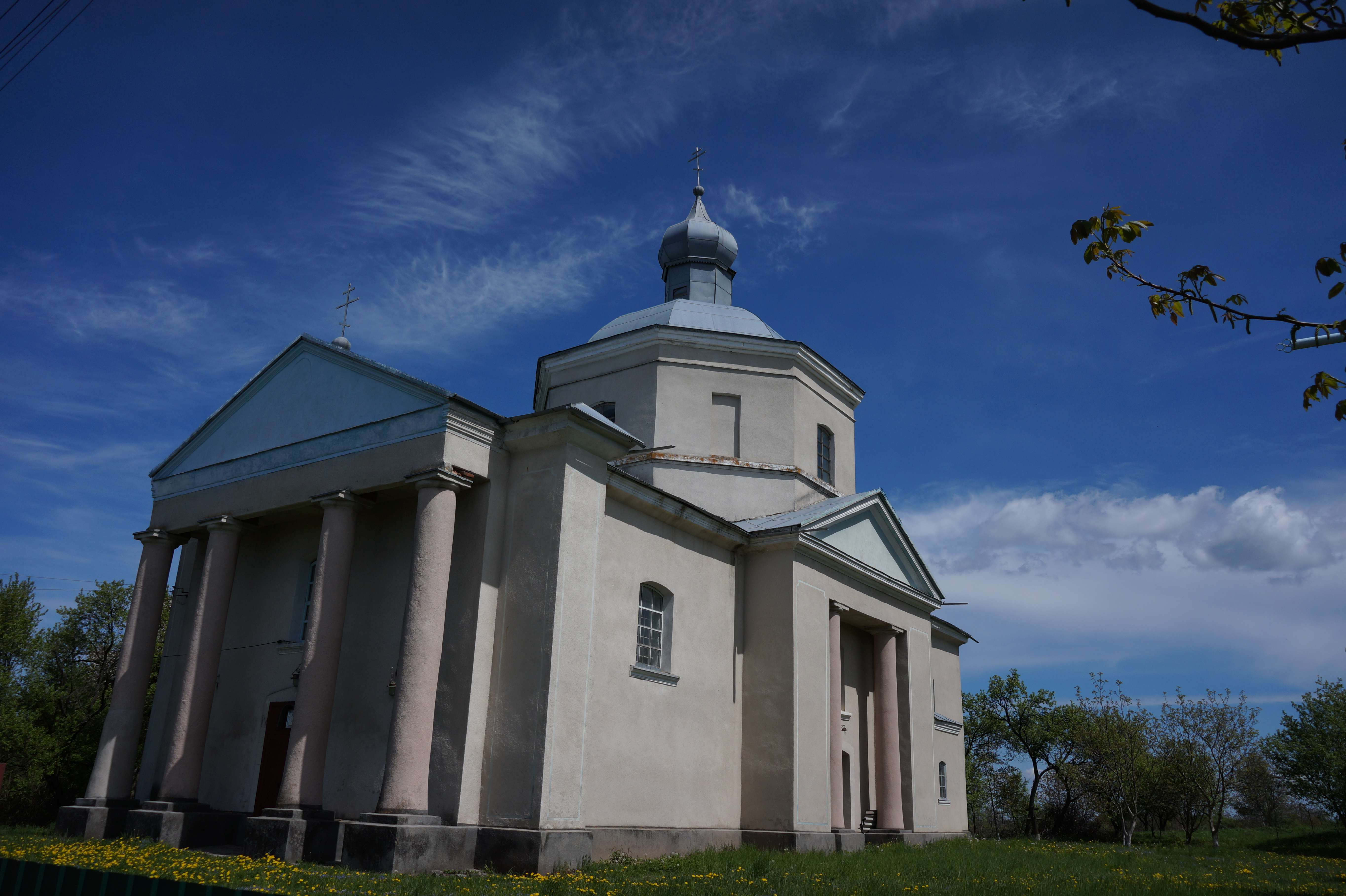 Михайлівська церква, село Терешівці